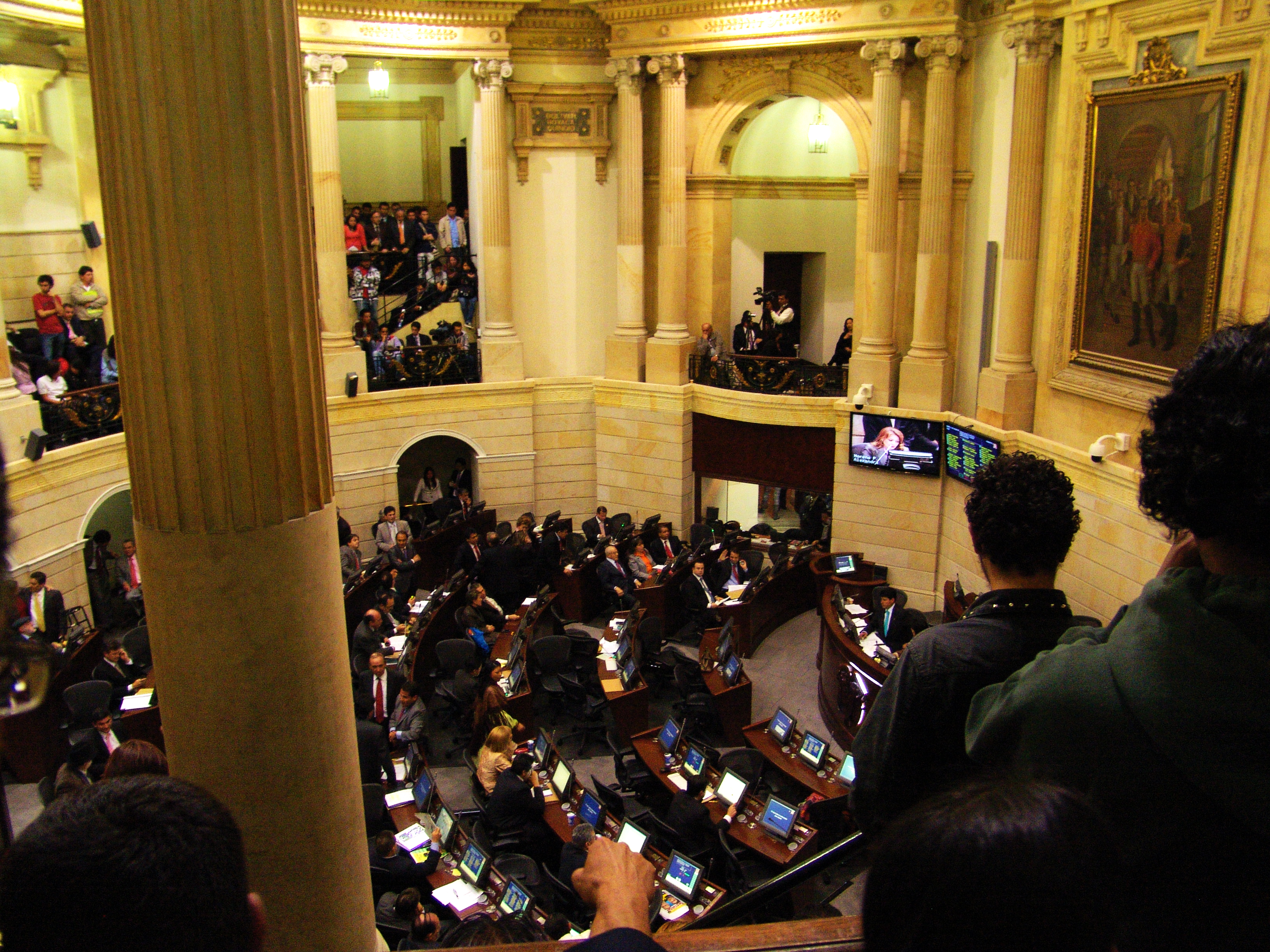 Panorama Senado Colombia